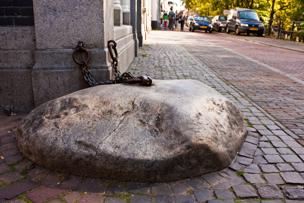 Het verhaal wil dat de duivel ‘s nachts met deze zwerfsteen over de straten van Utrecht knikkerde en zo bewoners door het helse lawaai hun dierbare nachtrust ontnam. Uiteindelijk heeft men besloten om de duivelsteen aan de ketting te leggen om het kabaal te stoppen. Chained to the corner house of Oudegracht 364. The story goes that the chain is to prevent the devil from rolling the rock at night.